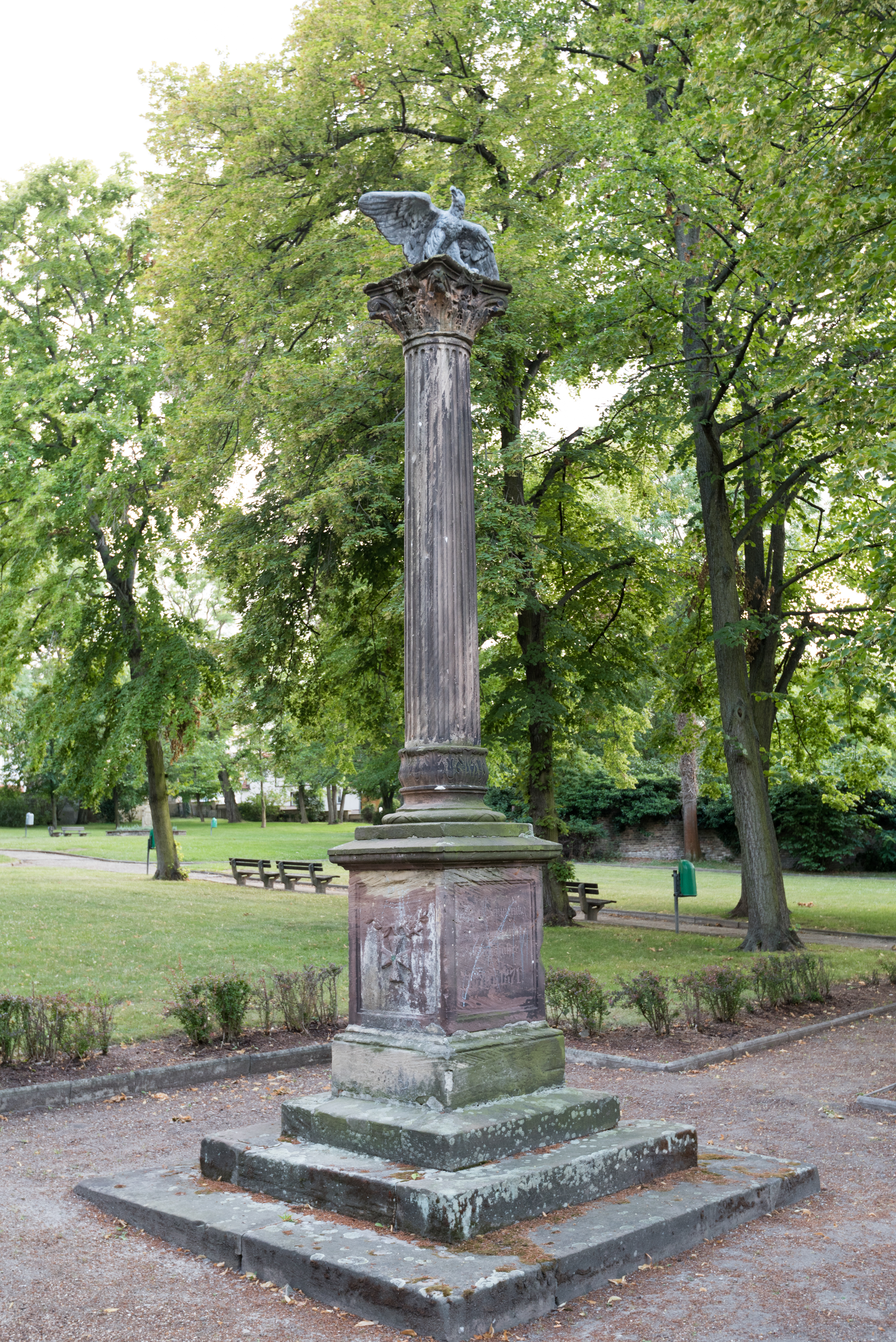 Mücheln, Oeltor, Kriegerdenkmal 1870-1871.